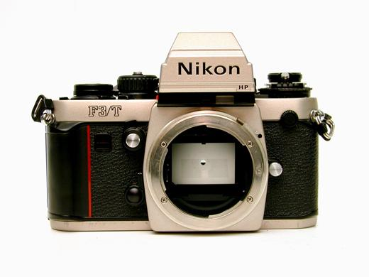 F3 Titan black